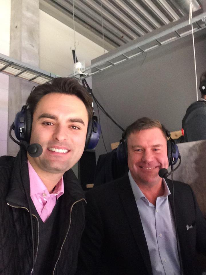 Dusan Umičević och Patrik Ross